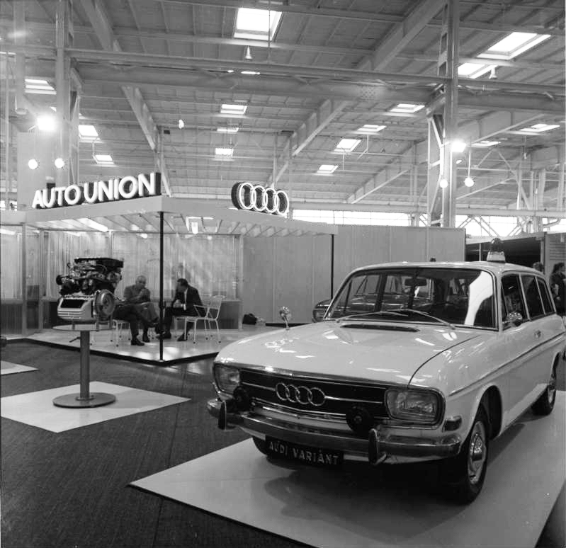 Internationale Polizei-Ausstellung Hannover 1966 Auto-Union